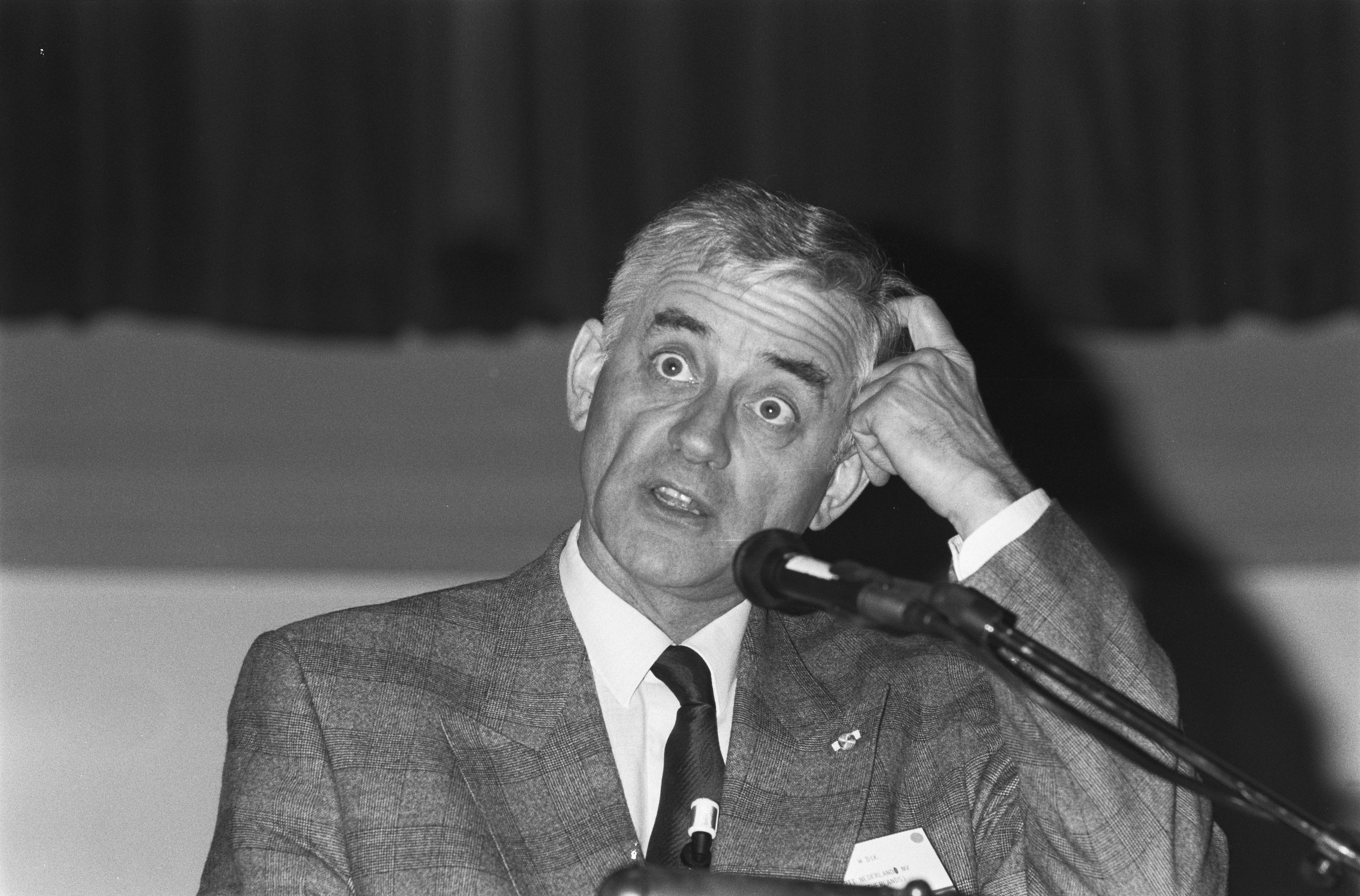 Collectie / Archief : Fotocollectie Anefo Reportage / Serie : [ onbekend ] Beschrijving : Ingenieur W. Dik Datum : 17 april 1989 Trefwoorden : Persoonsnaam : . Fotograaf : Croes, Rob / Anefo Auteursrechthebbende : Nationaal Archief Materiaalsoort : Negatief (zwart/wit) Nummer archiefinventaris : bekijk toegang 2.24.01.05 Bestanddeelnummer : 934-4398